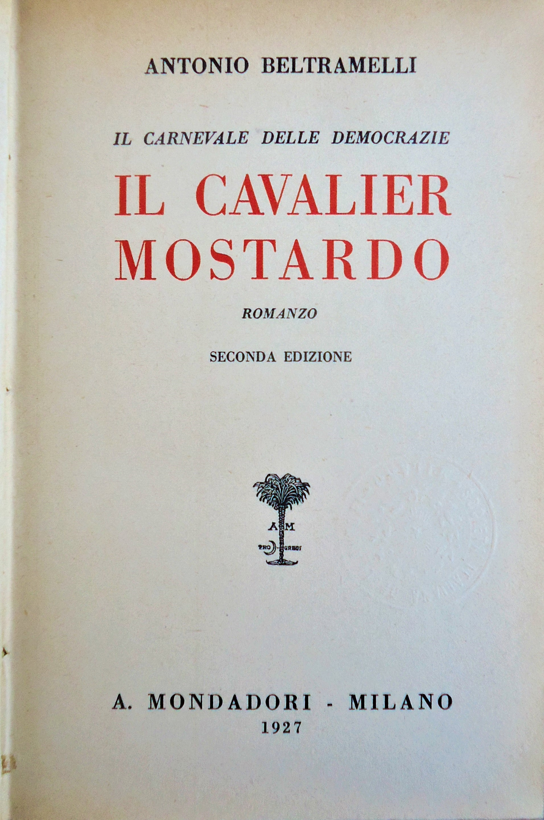 Romanzo. La prima edizione è del 1922.